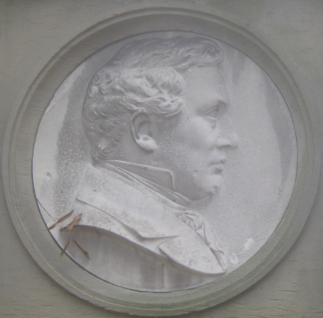 Bildnismedaillon August Hedingers auf seinem Grab auf dem Fangelsbachfriedhof in Stuttgart, Abteilung 11.